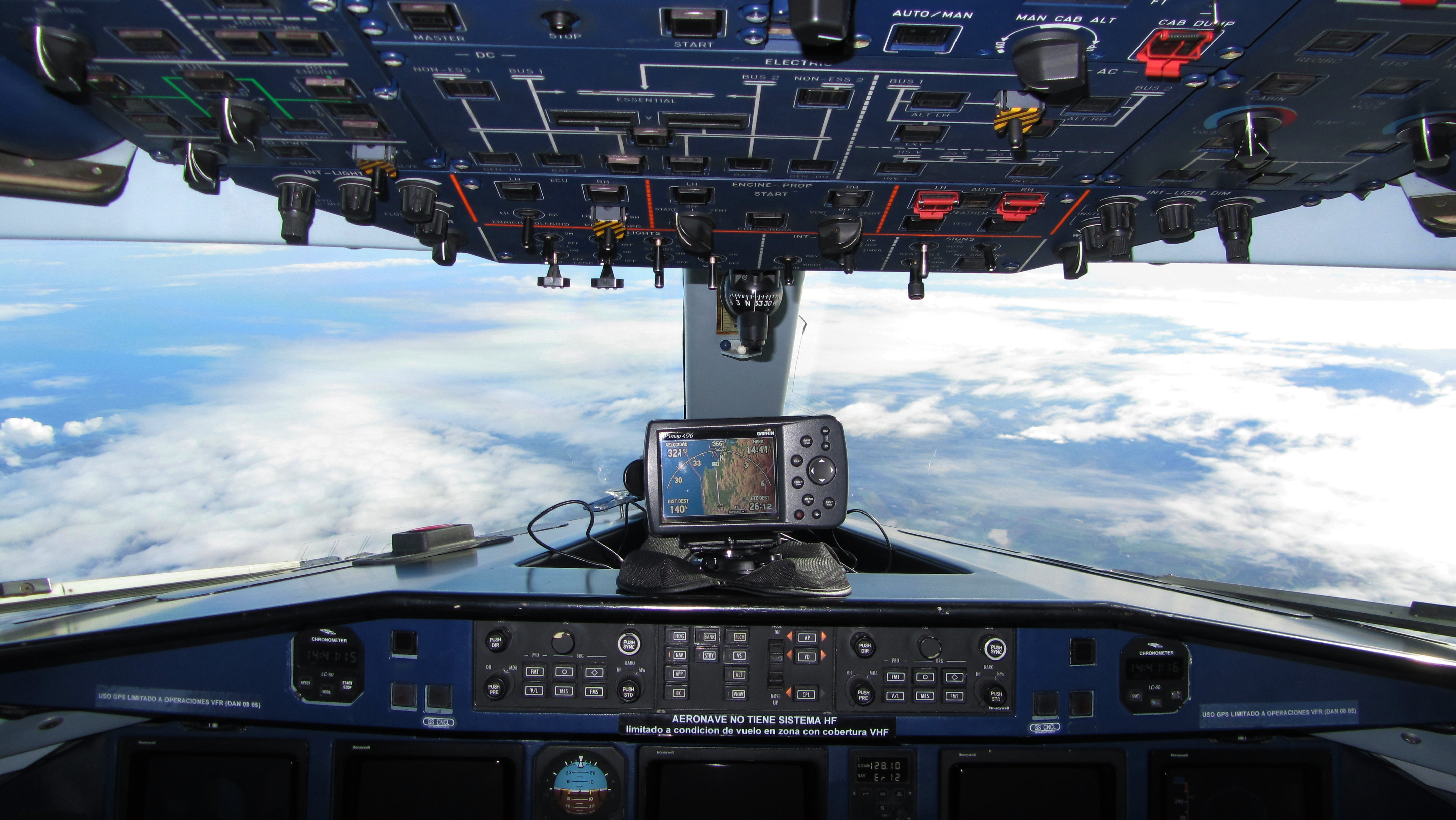 Foto: William Olave